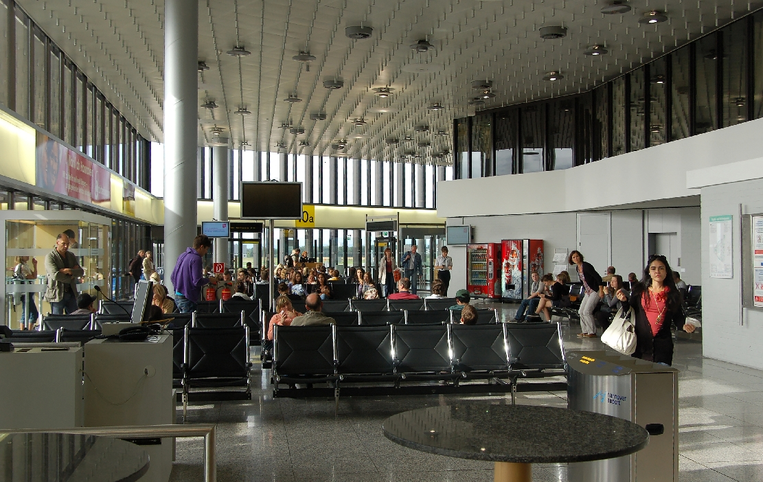 Hannover, Flughafen und Abflugsgebiet)